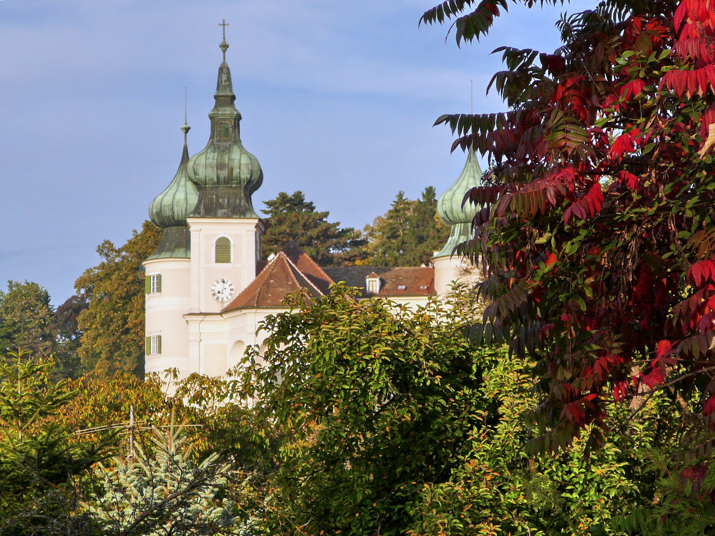 Artstetten, Kirche und Schloss